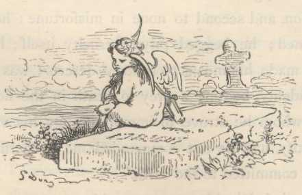 O túmulo de Crisóstomo que morreu de amor por Marcela